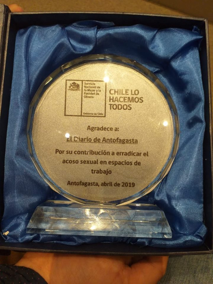 Reconocimiento del Sernameg de Antofagasta para El Diario de Antofagasta